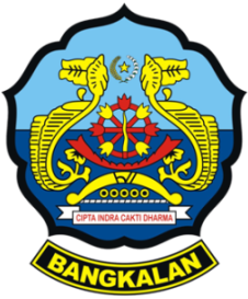 Lambang Daerah Kabupaten Bangkalan, Jawa Timur